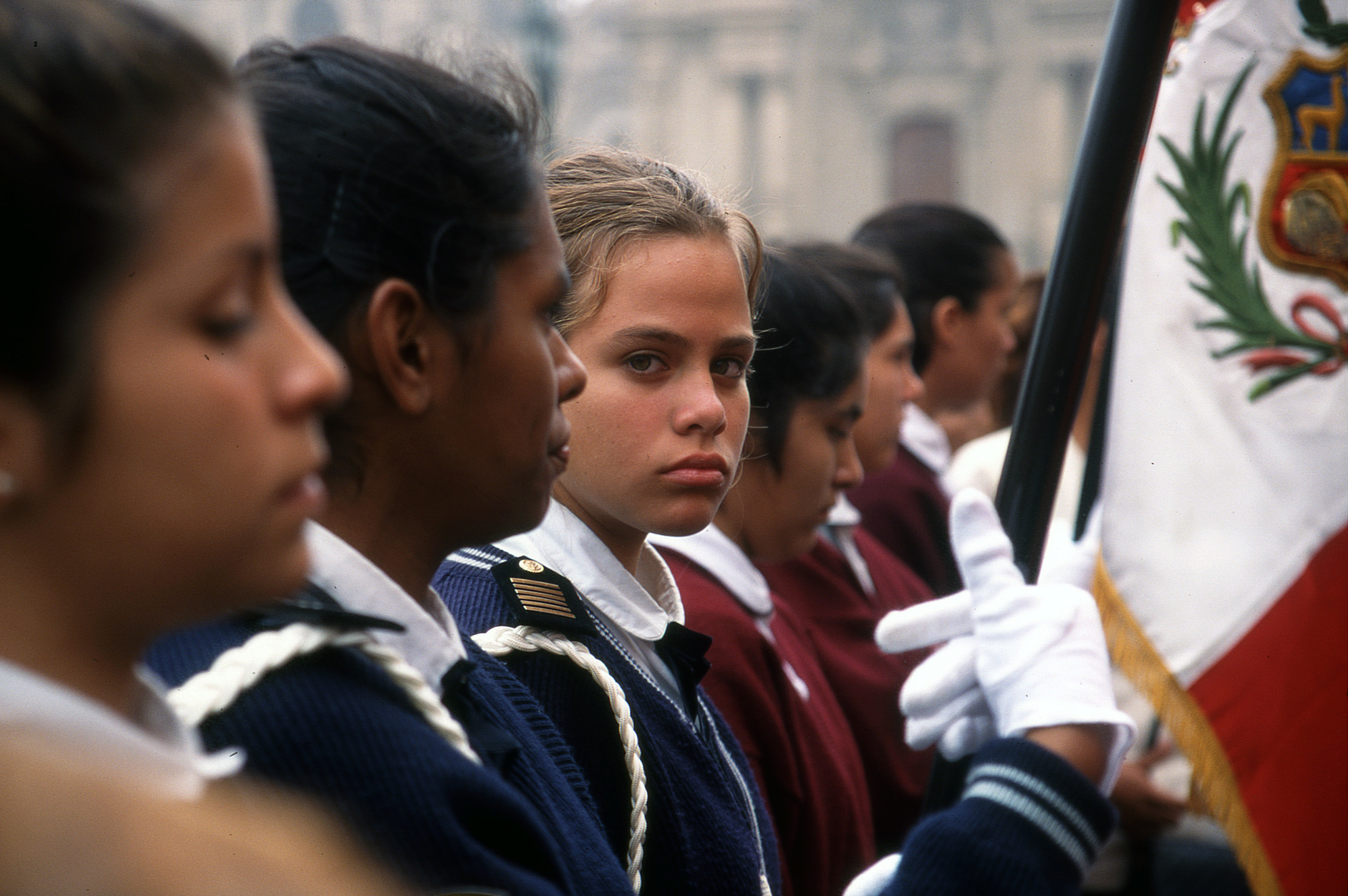 perou lima, place du palais royal, les ecolières de lima pendant les fêtes de mai